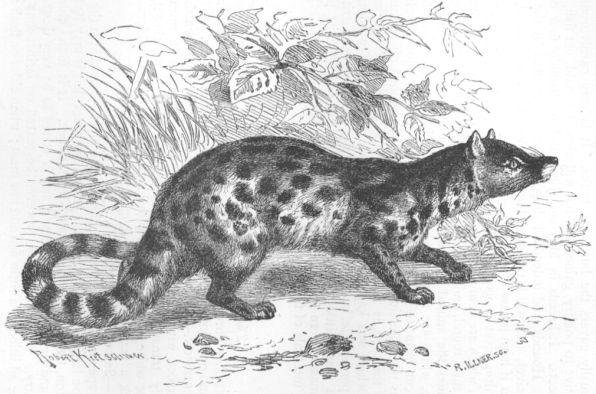 Viverra megaspila